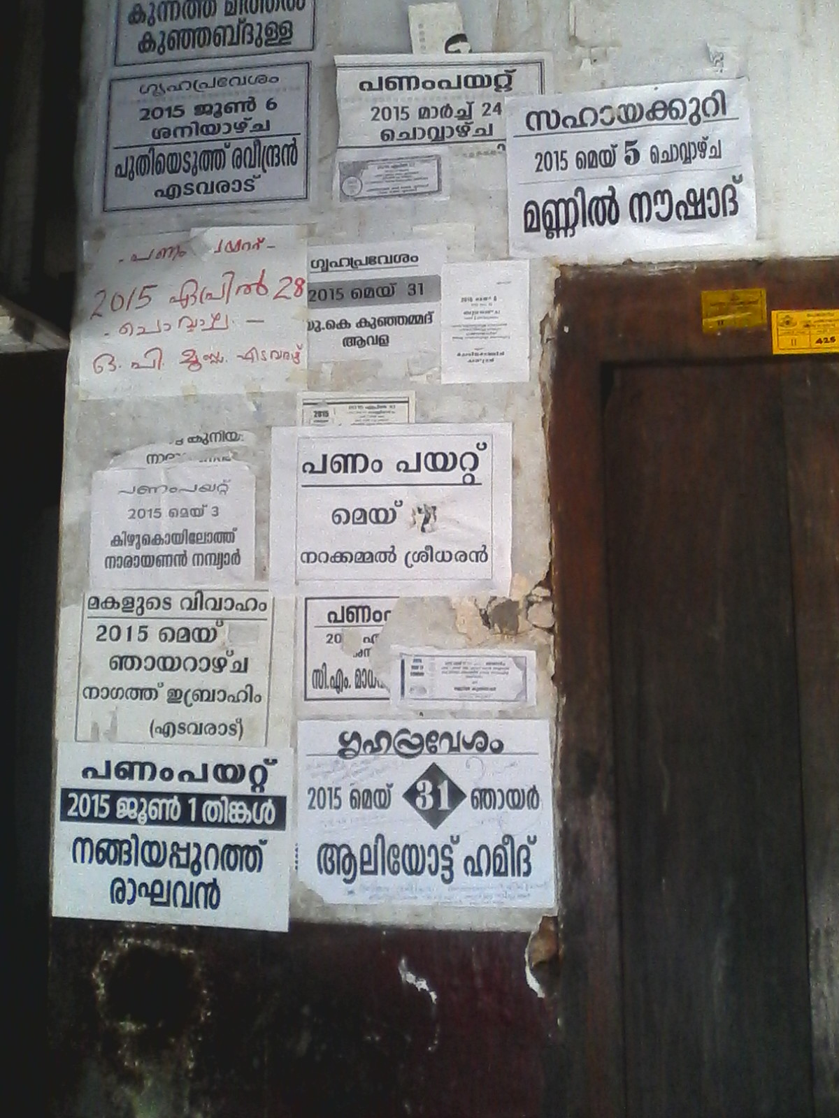 പേരാമ്പ്രയ്ക്കടുത്ത് ഒരങ്ങാടിയിലെ കെട്ടിടച്ചുമരിൽ ഒട്ടിച്ചിരിക്കുന്ന അറിയിപ്പുകൾ